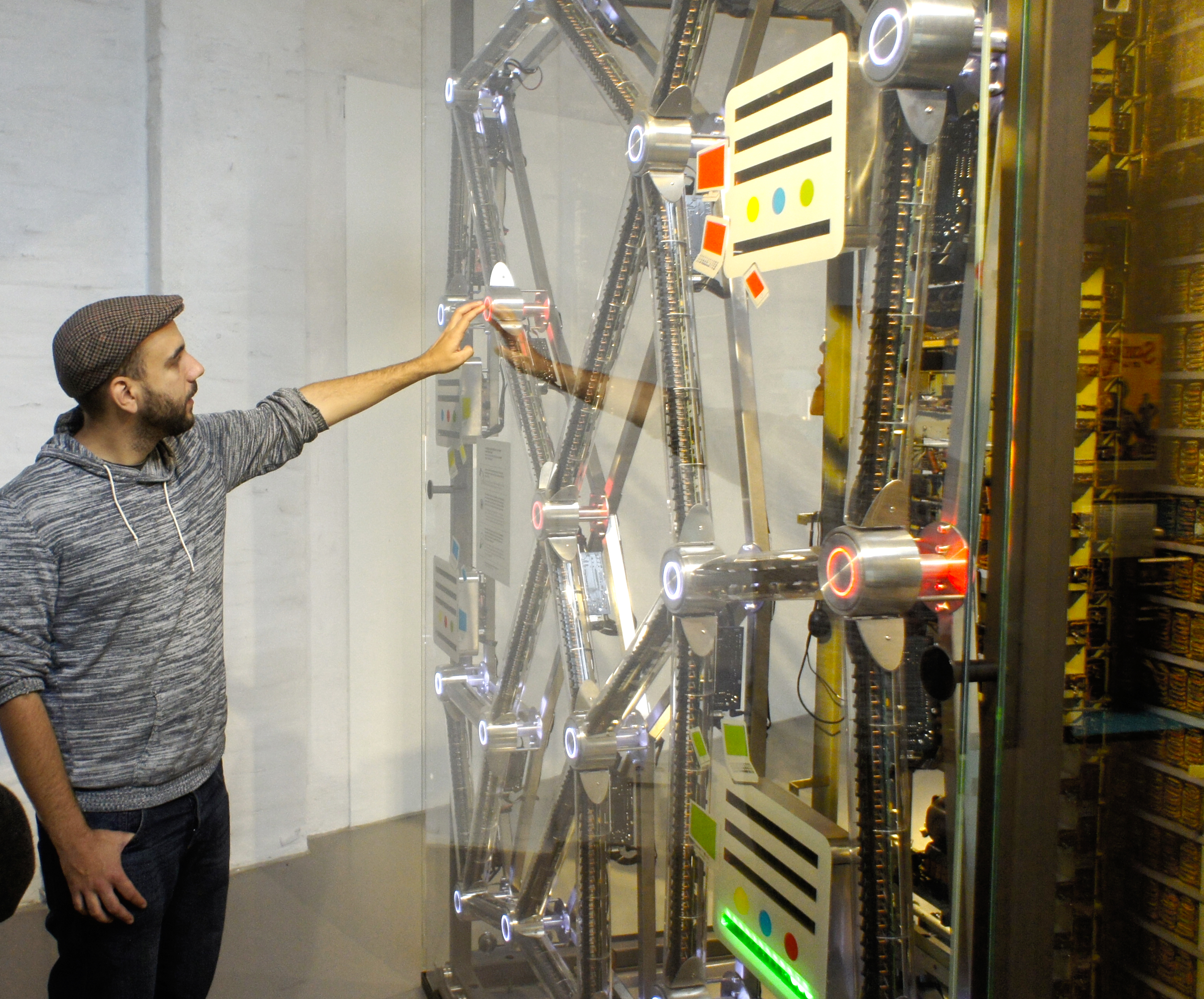 Interaktives Exponat, welches die Funktionsweise von Datenpaketen im Internet veranschaulicht. Teil der Sonderausstellung "Das Netz" im Science Center Spectrum in Berlin.